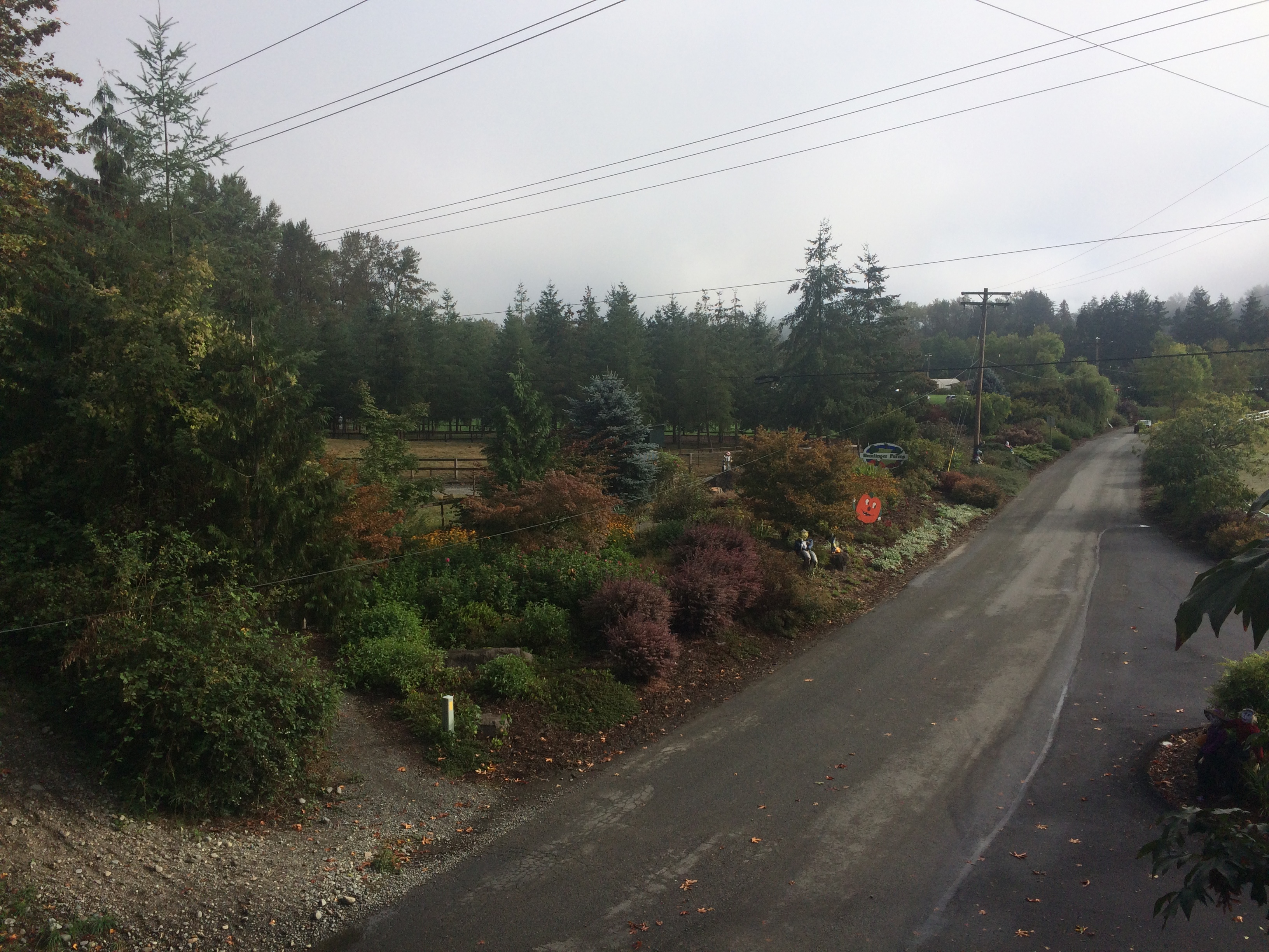 Remlinger Farms